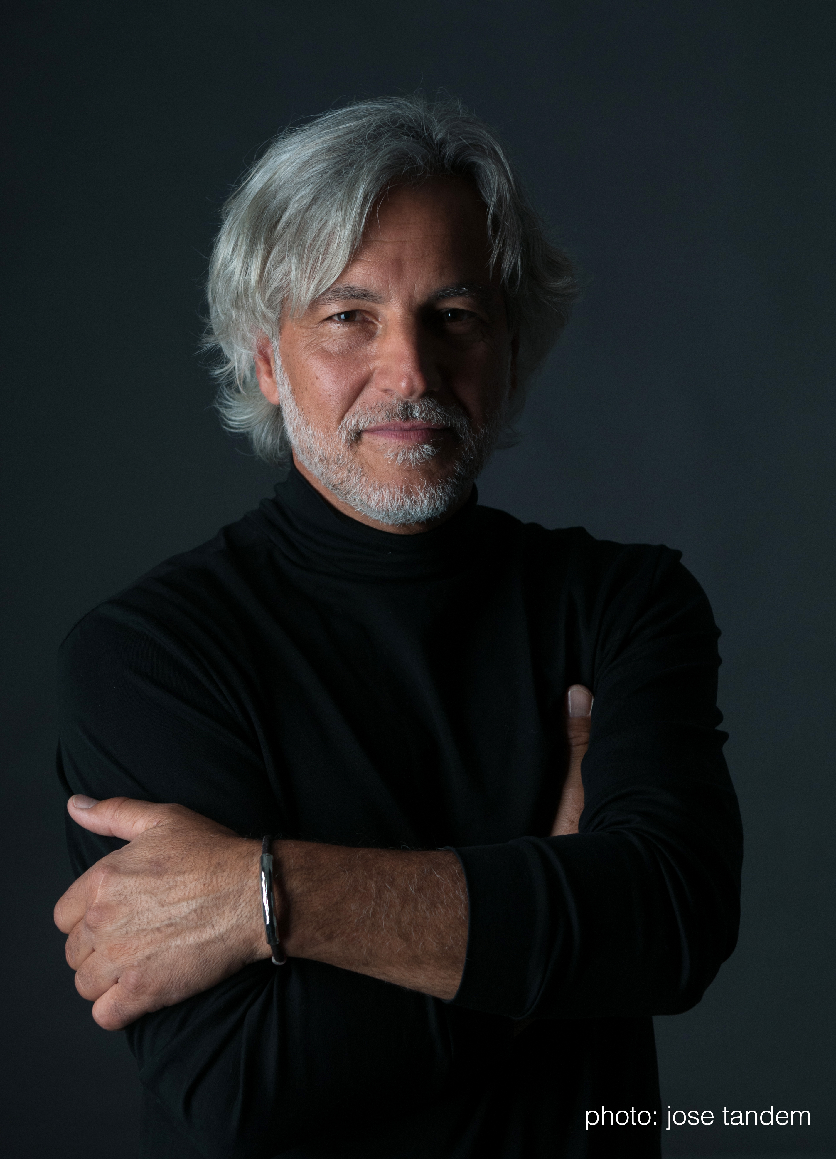 Изображен Крис Сфирис, портрет сделан фотографом Jose Tandem, в Мадриде, Испания.